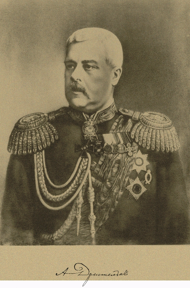 Александр Романович Дрентельн (1820—1888) — русский генерал-адъютант (6 июля 1867), генерал от инфантерии, член Государственного совета, шеф Отдельного корпуса жандармов, командующий войсками Киевского военного округа и Киевский, Подольский и Волынский генерал-губернатор.